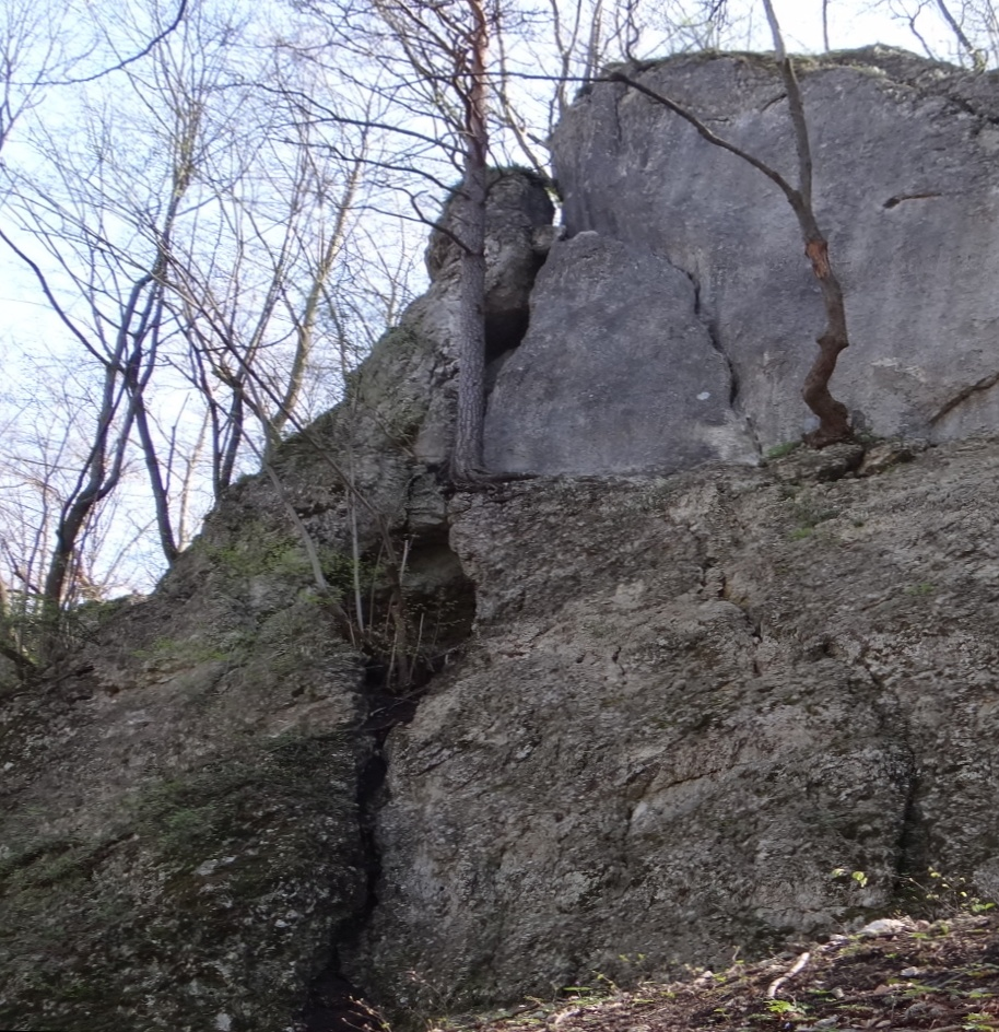 Pozornica Lewa